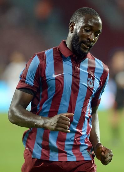 Mustapha Yatabaré Trabzonspor Fenerbahçe maçında gol ile tanışamadı